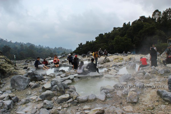 Kenampakan alam Kawah Domas